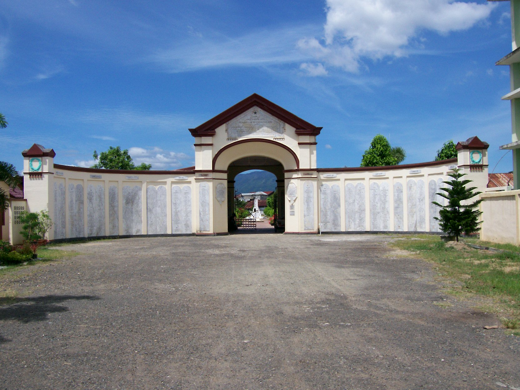 Gerbang masuk pekuburan Peucut